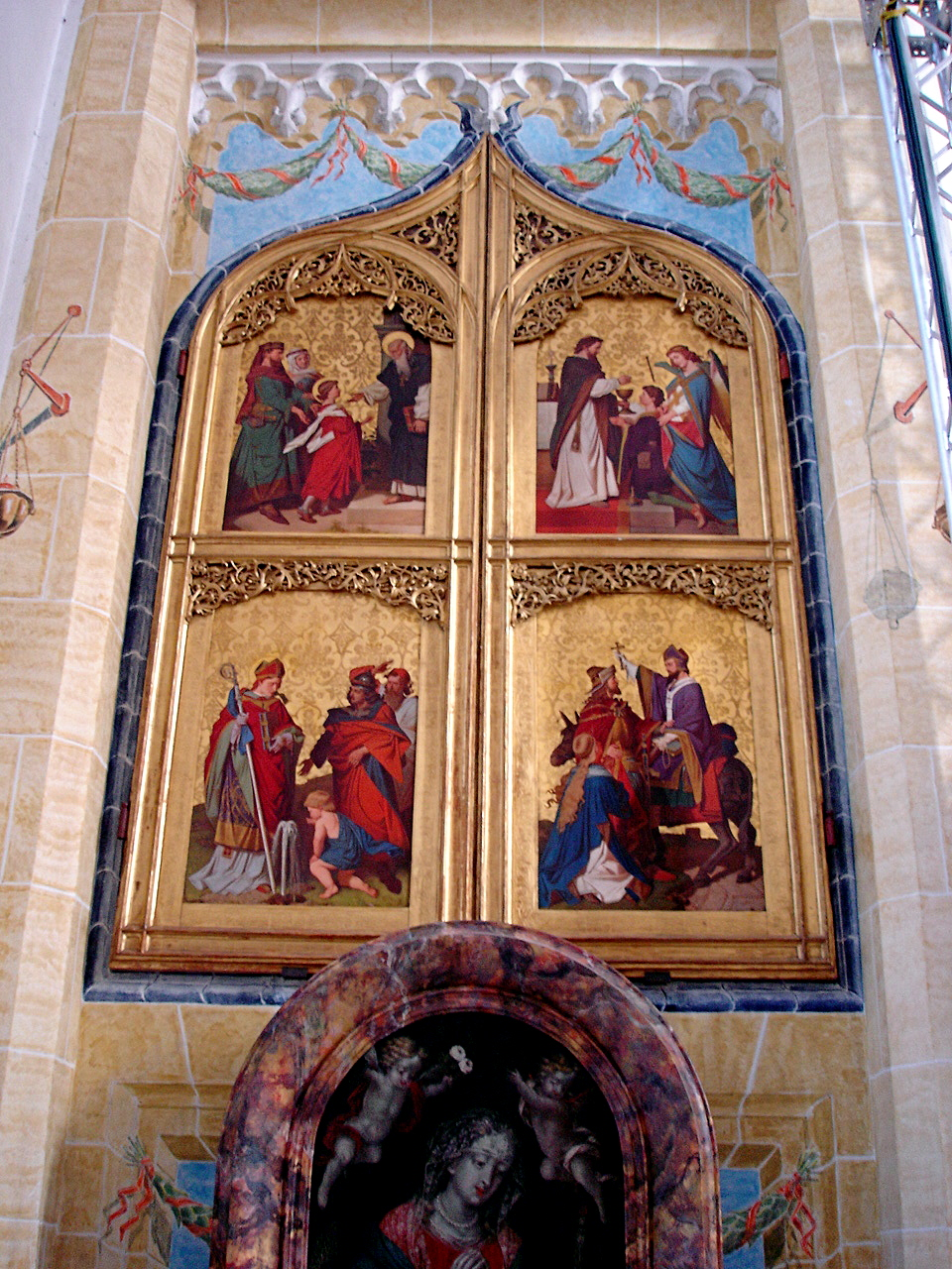 Der Altar in der Thomaskapelle, Frauenkirche München; Flügelbilder mit Legenden aus dem Leben des hl. Korbinian (rechts) und Benno von Meißen (links), darunter das Marienbild